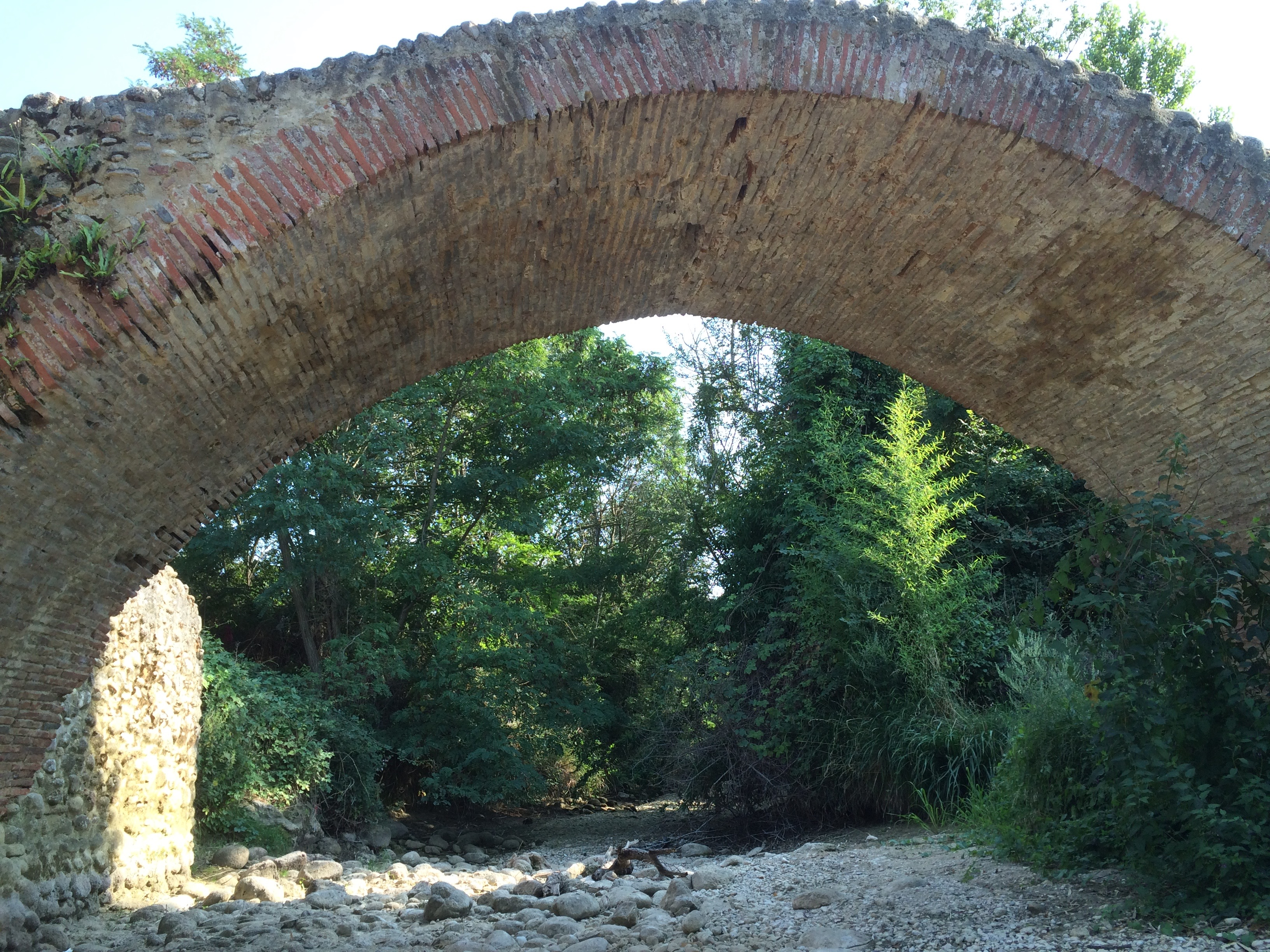 Pont en pierre à la sortie de Pamiers sur le sentier de Saint-Jacques-de-Compostelle.